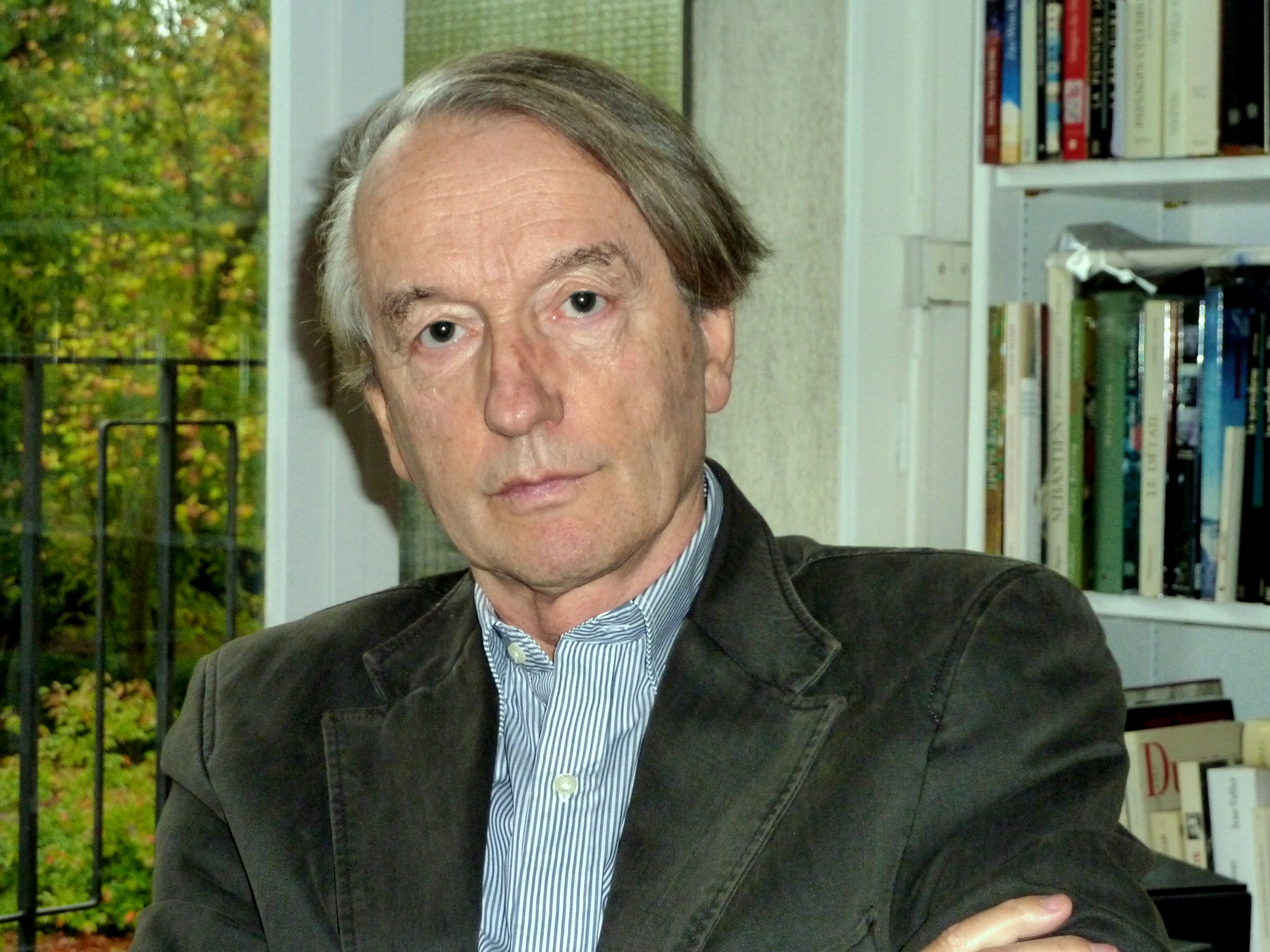 Patrick Grainville, prix Goncourt 1976, lors d'une rencontre chez un libraire en 2011.